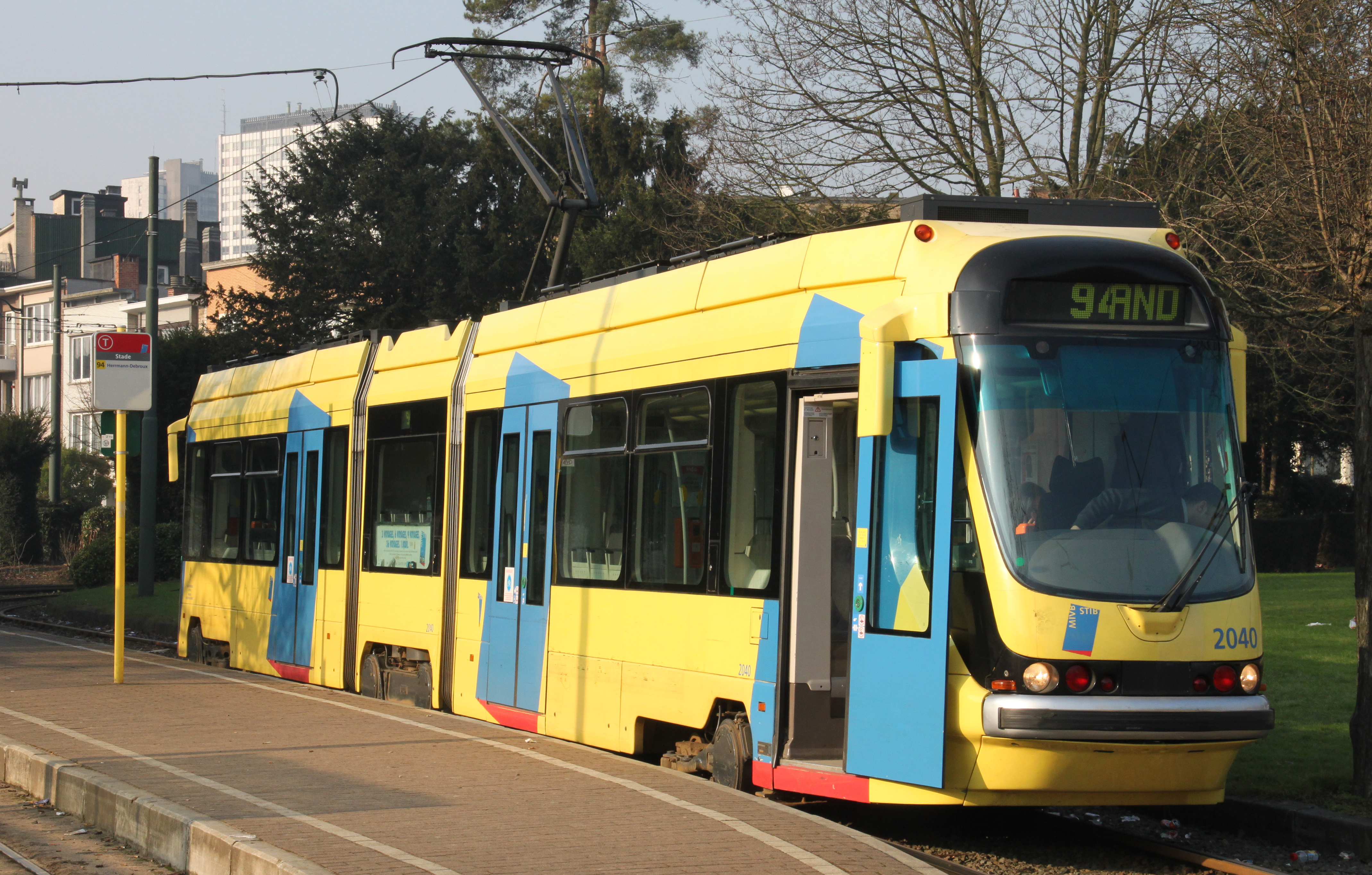 De 2040 te Houba de Strooper in 2010.